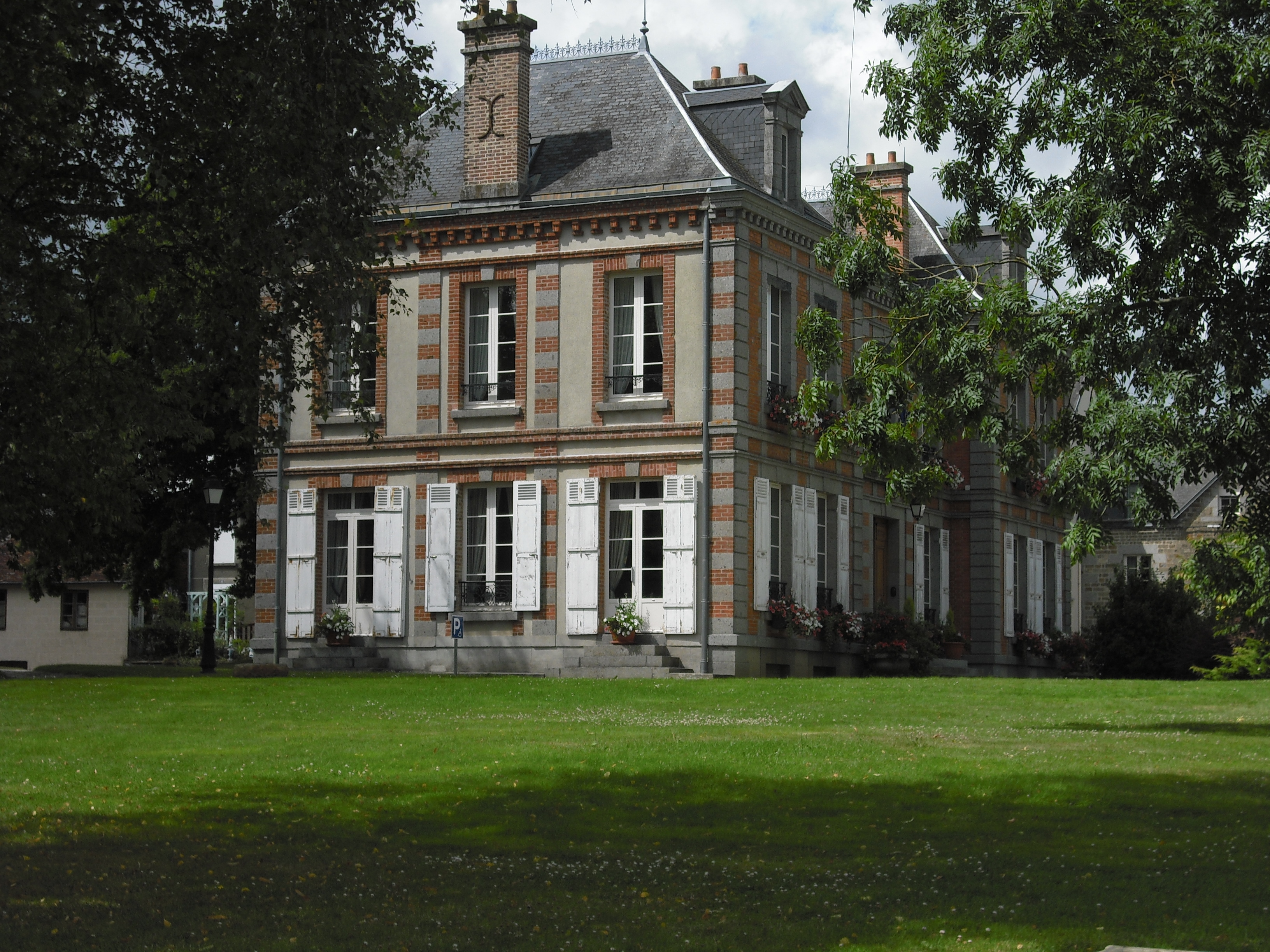 Château d'Emile de Marcère, construit vers 1870.